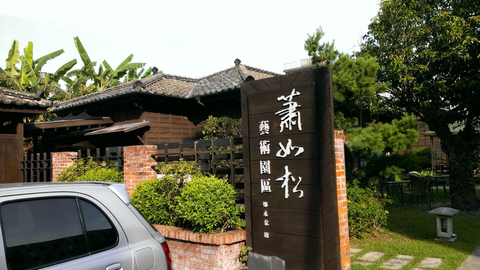 蕭如松藝術園區大門